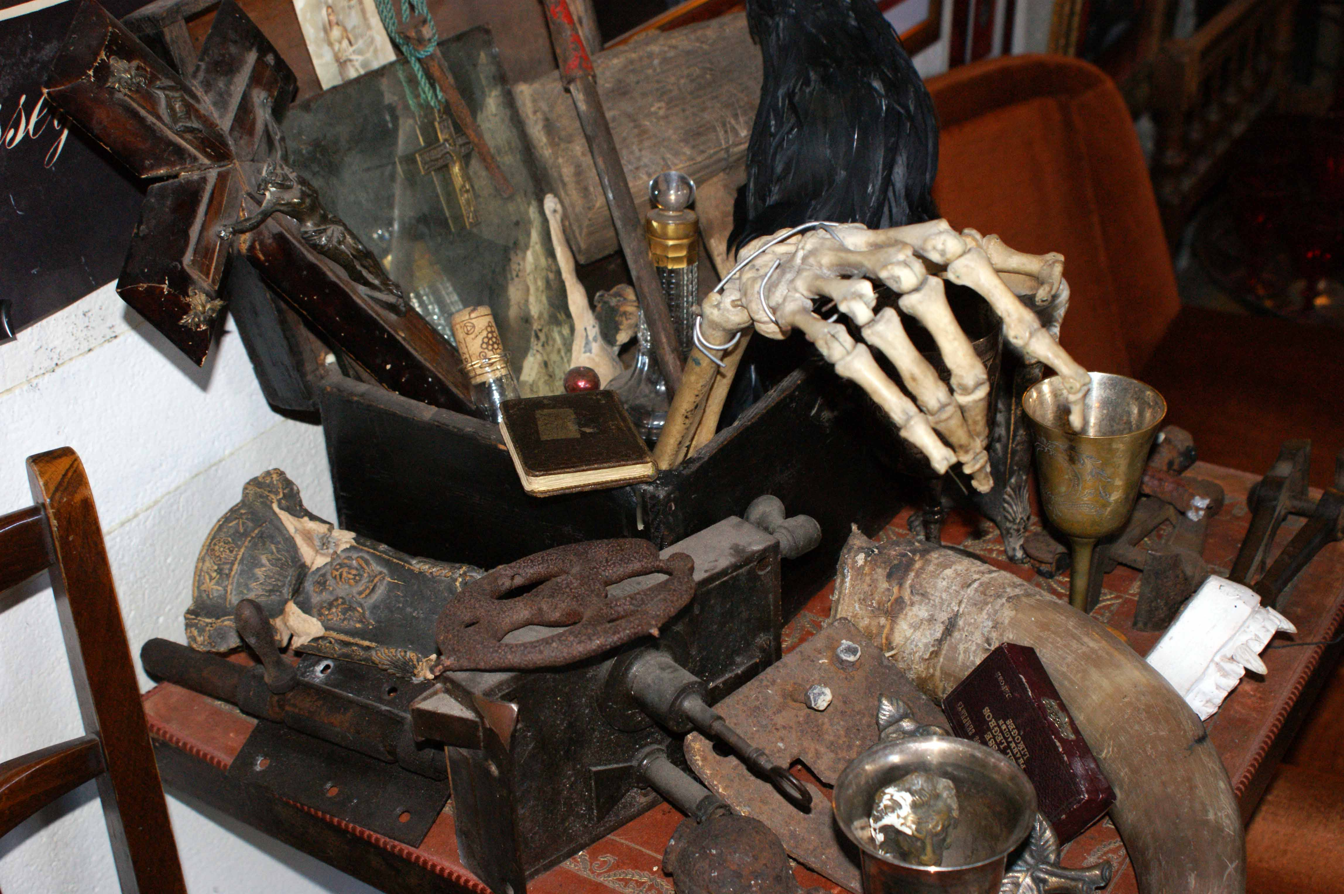 Ensemble d'objets utilisés pour lutter contre les vampires